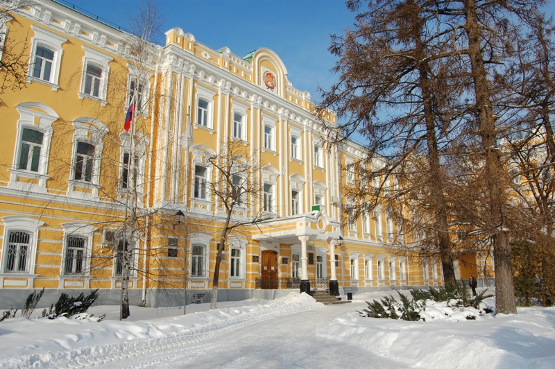 общий вид на главный корпус РГУ имени С. А. Есенина